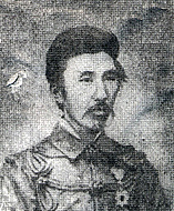 Japanese politician Oura Kanetaka (1866-1943)